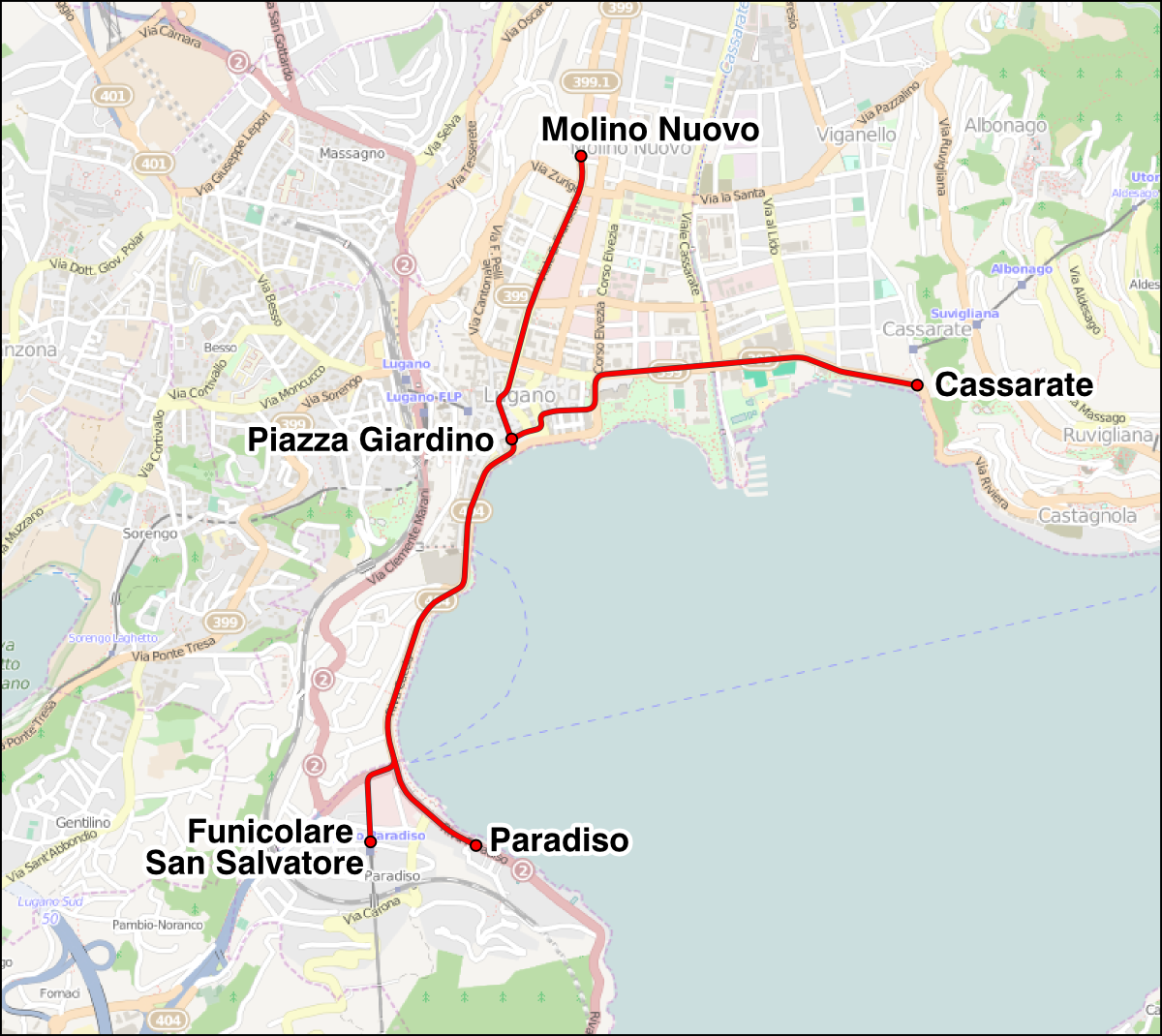 Mappa della rete tranviaria di Lugano all’atto dell’attivazione, il 1° giugno 1896. Fonte: A. Denzler, Der Drehstrom-Tram in Lugano in Schweizerische Bauzeitung, Band XXVII, nº 25, 20 giugno 1896, pp. 175-179. This map may be incomplete, and may contain errors. Don't rely solely on it for navigation.